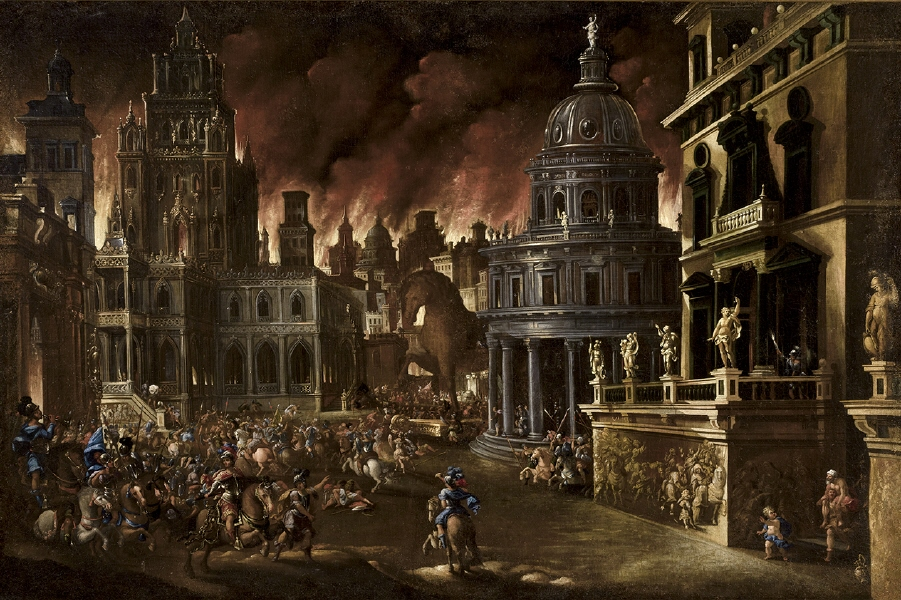 Cuadro barroco de la escuela madrileña. Nótese que los edificios tienen un aire europeo de la época en la que fue pintado.